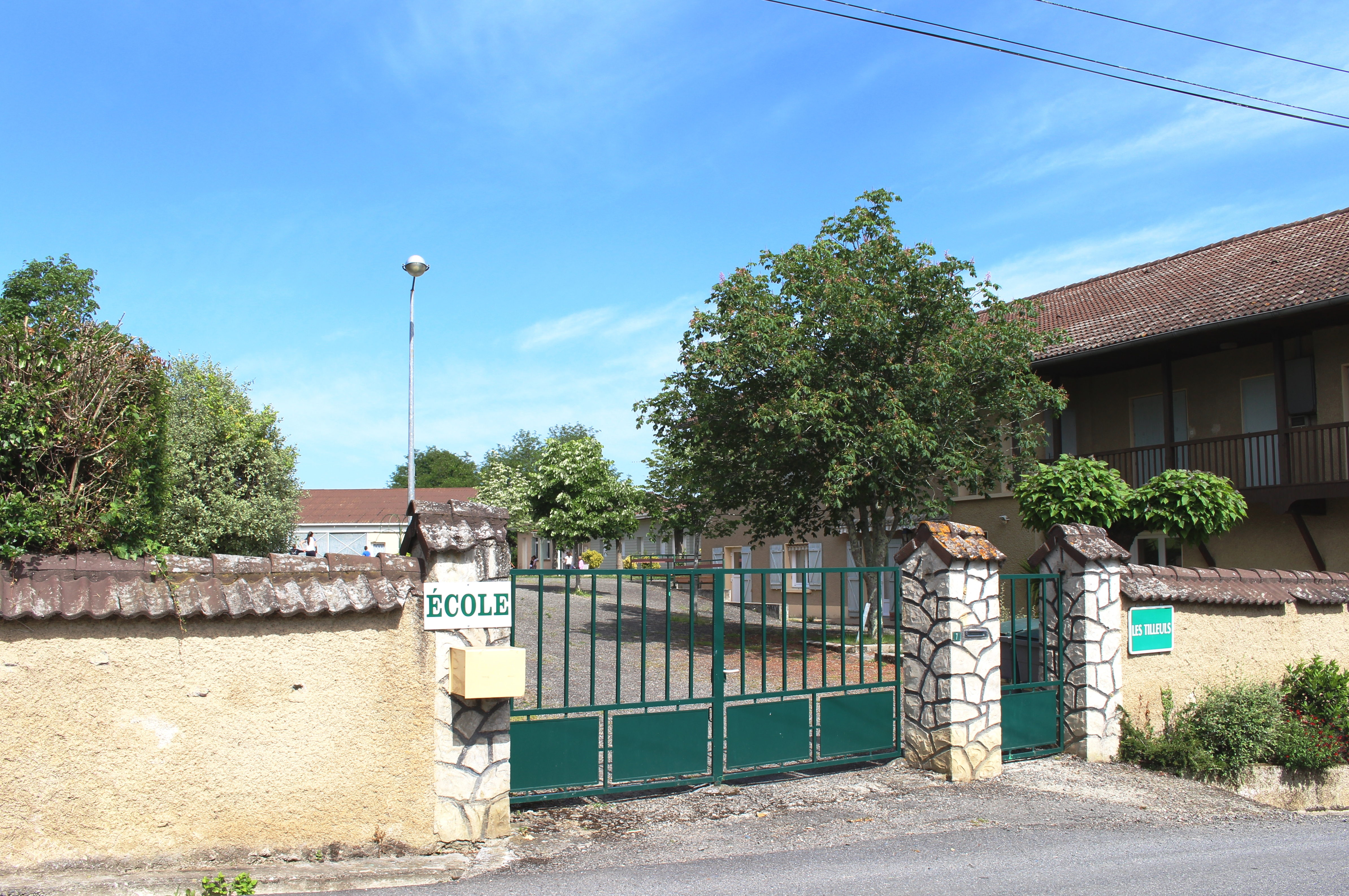 École de Castelvieilh (Hautes-Pyrénées)